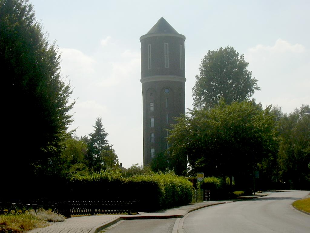 Merken Wasserturm own work papa1234 2006-07.23